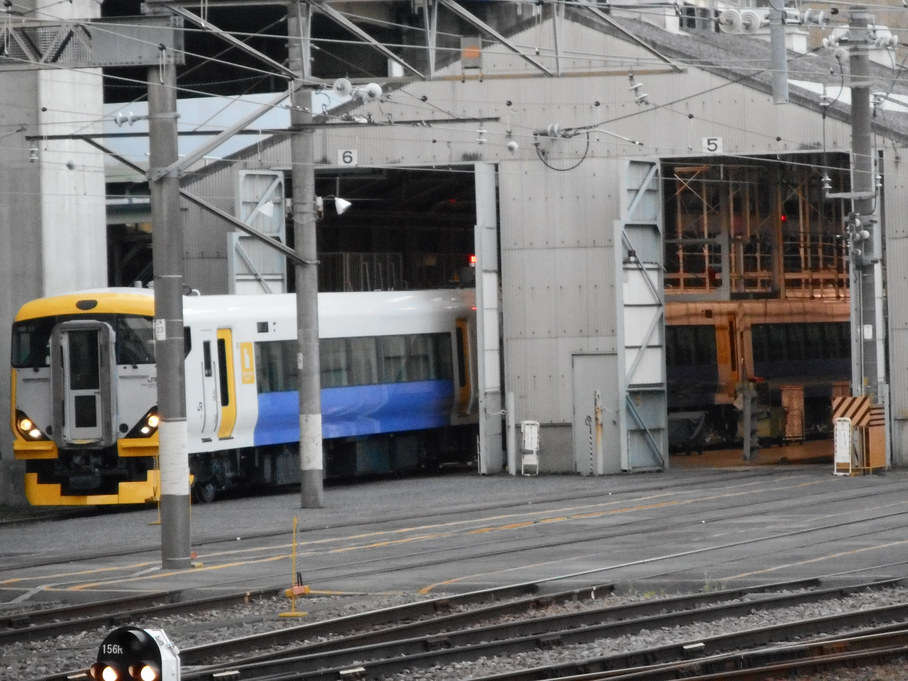 大宮総合車両センター設備：EC整備棟南側出口－大宮駅11番線ホームから撮影